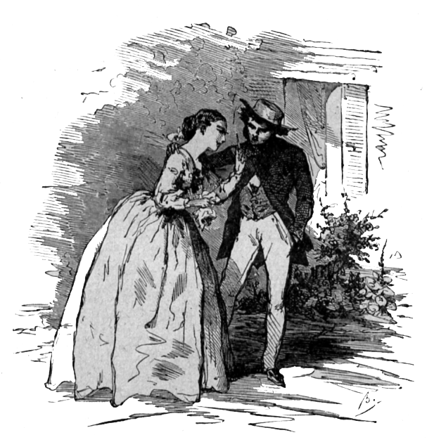 Pour la source voir : Discuter:Contes d'Andersen Vignette de La Vieille Maison par Bertall représentant la femme et le mari.